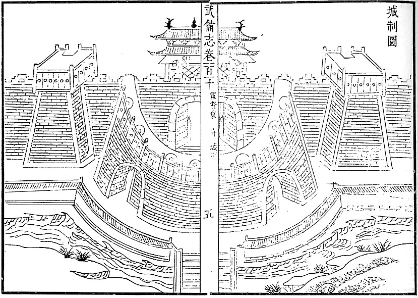 武備志城制圖